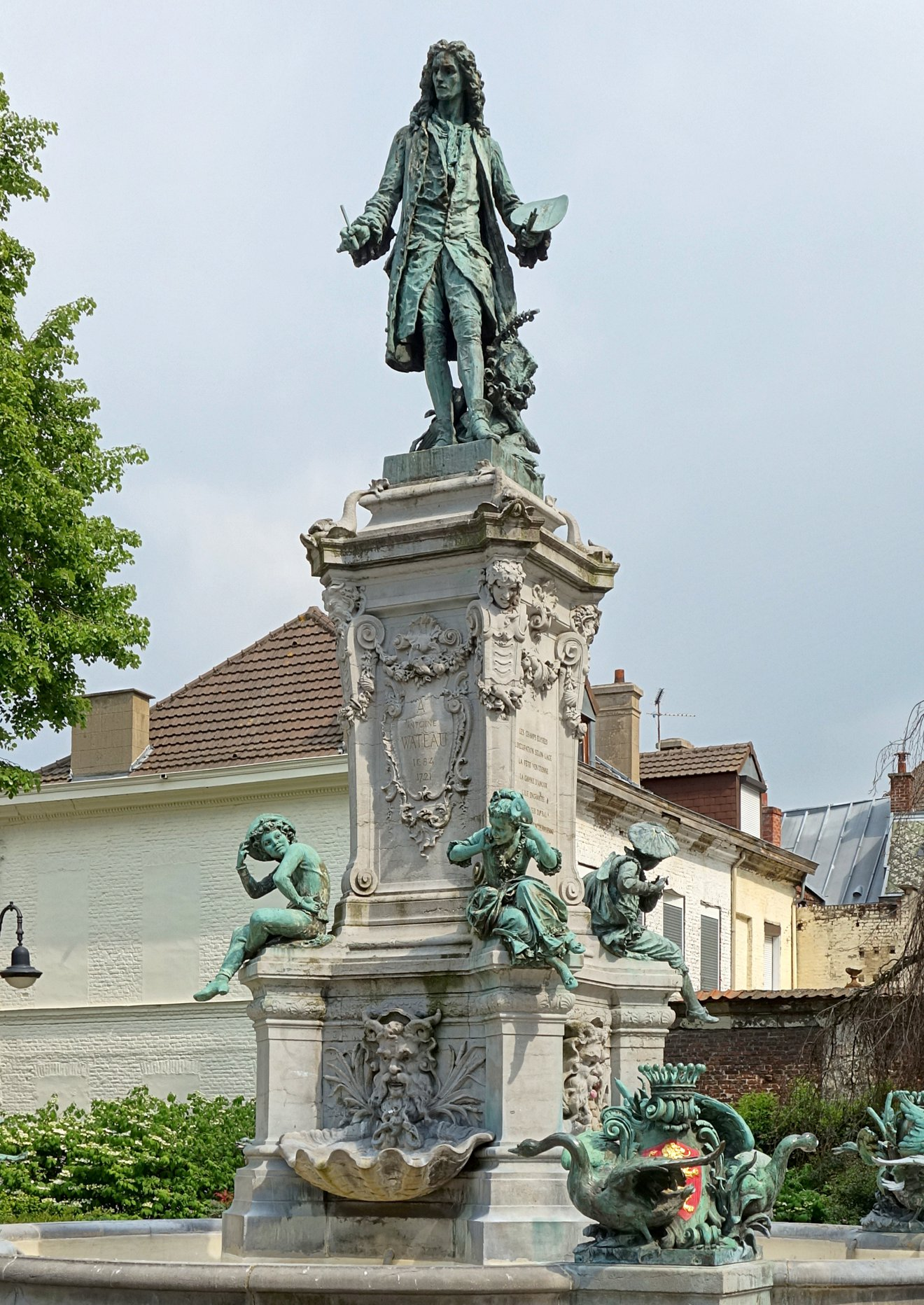 Monument à Antoine Watteau à Valenciennes